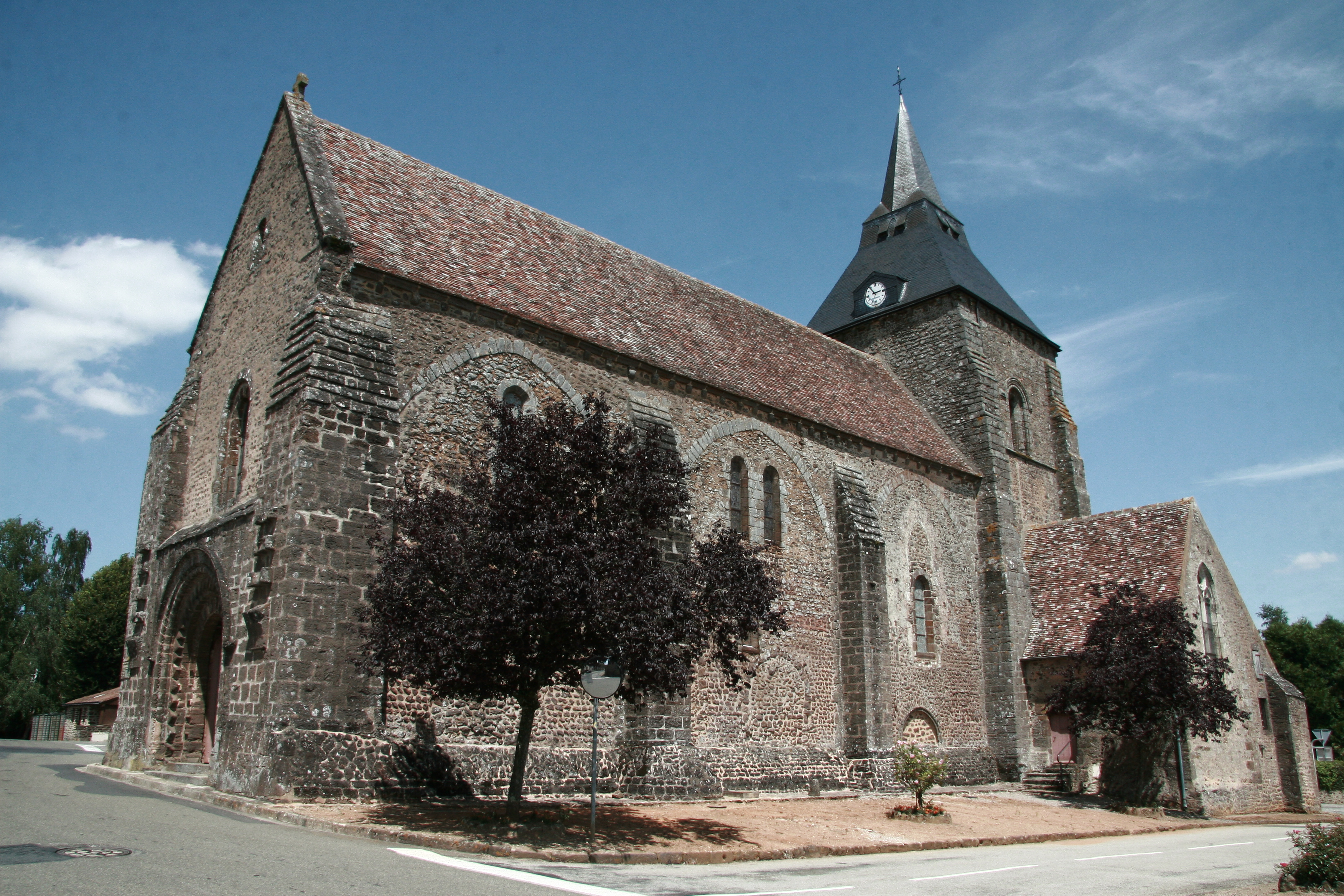 Église Saint-Christophe de Saint-Christophe-du-Jambet, Sarthe, Pays de la Loire, France